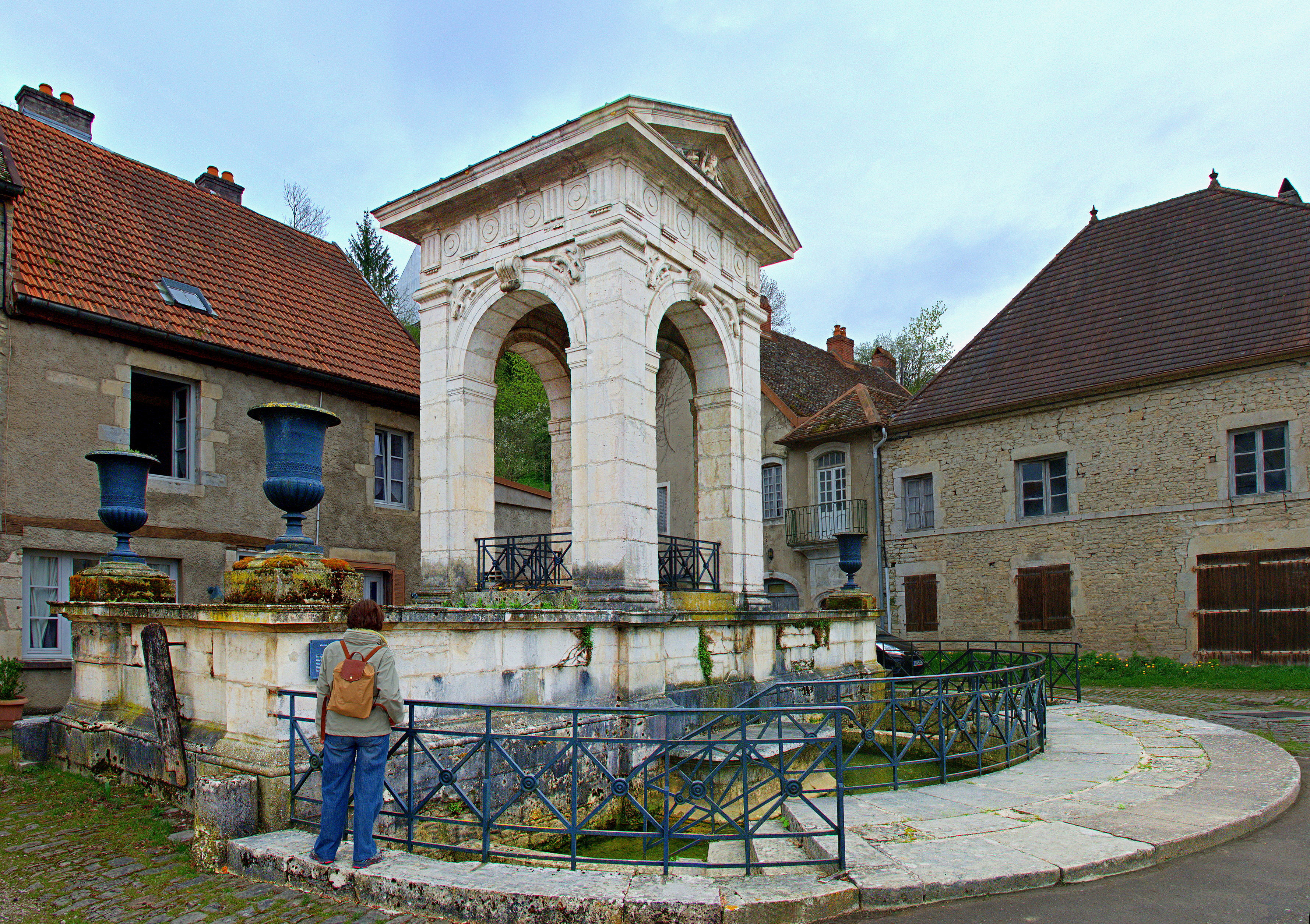 Inscrit aux monuments historiques sous le numéro PA70000051